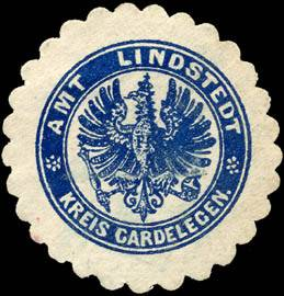 Sealing stamp Title: Amt Lindstedt - Kreis Gardelegen Description: dunkelblau, weiß, geprägt Place: Lindstedt size: 3 cm